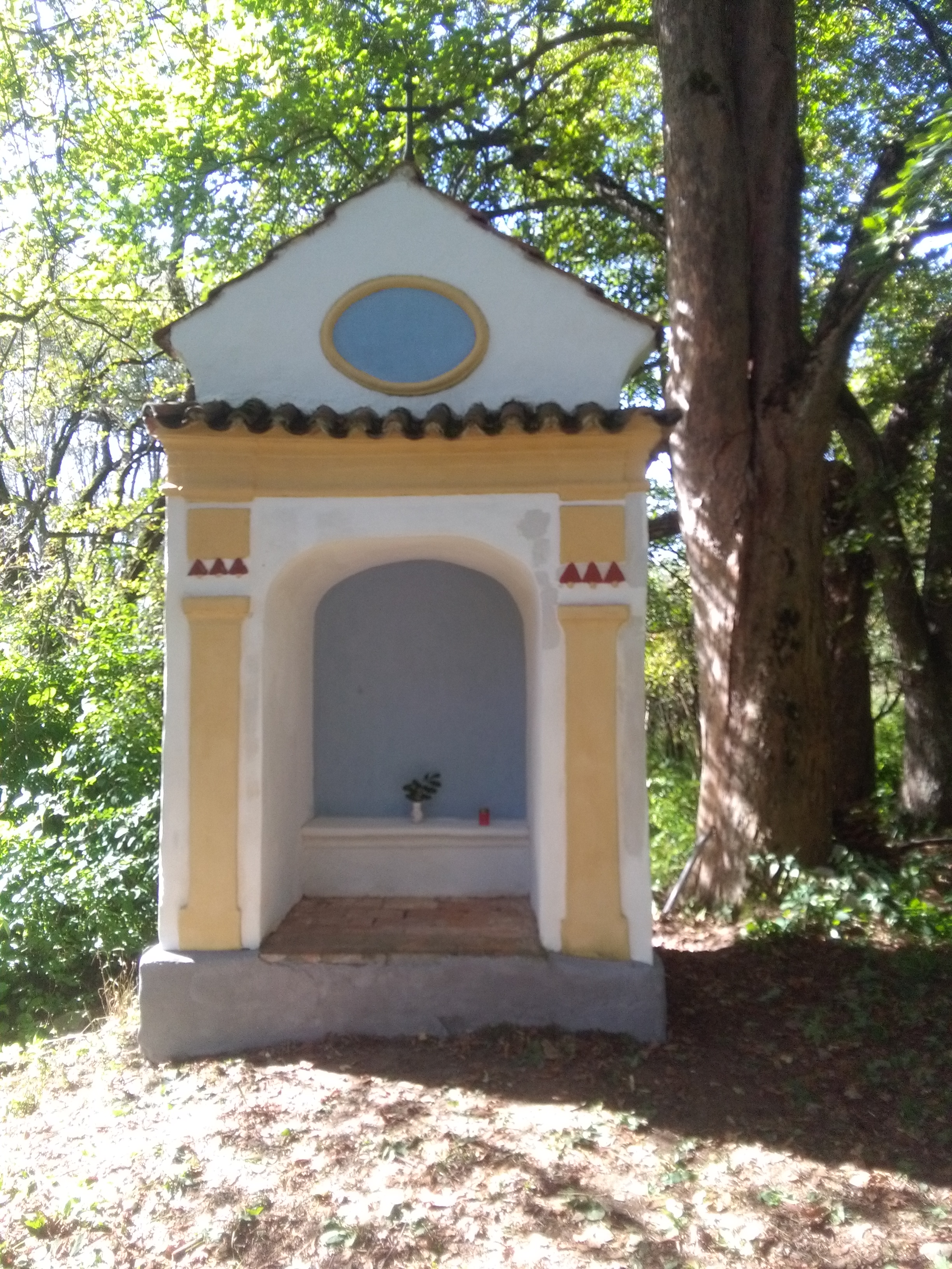 Polžov (Lužnice u Pohorské Vsi)